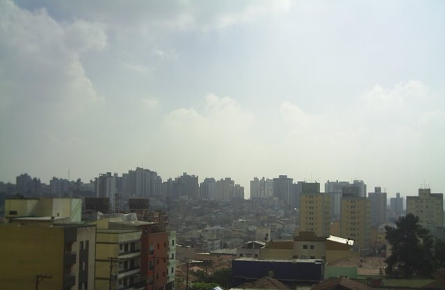 São Caetano do Sul.